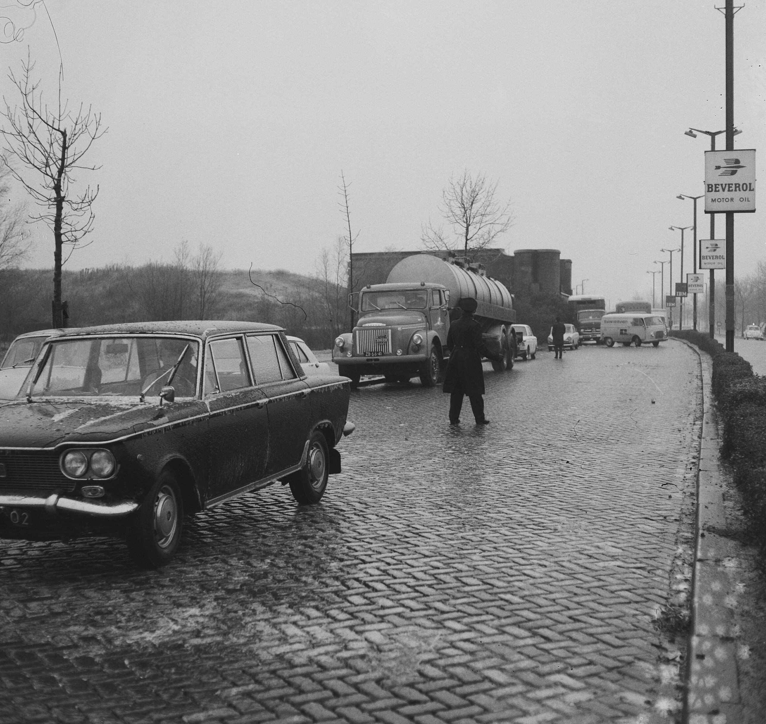 Collectie / Archief : Fotocollectie Anefo Reportage / Serie : Verkeerschaos in Amsterdam door spiegelgladde wegen Beschrijving : Auto's en vrachtwagens op de Oude Haagseweg Datum : 20 november 1965 Locatie : Amsterdam, Noord-Holland Trefwoorden : auto's, gladheid, verkeer, vrachtwagens, weer Fotograaf : Nijs, Jac. de / Anefo Auteursrechthebbende : Nationaal Archief Materiaalsoort : Negatief (zwart/wit) Nummer archiefinventaris : bekijk toegang 2.24.01.03 Bestanddeelnummer : 918-4669